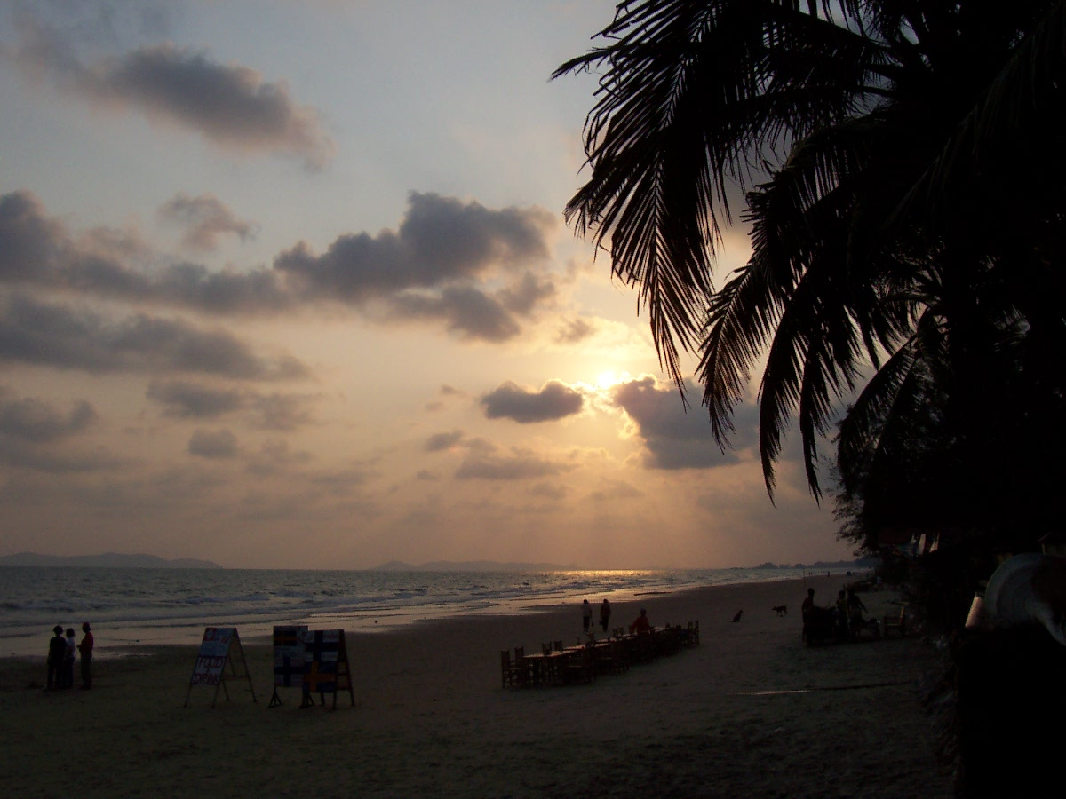 Rayong, Thailand